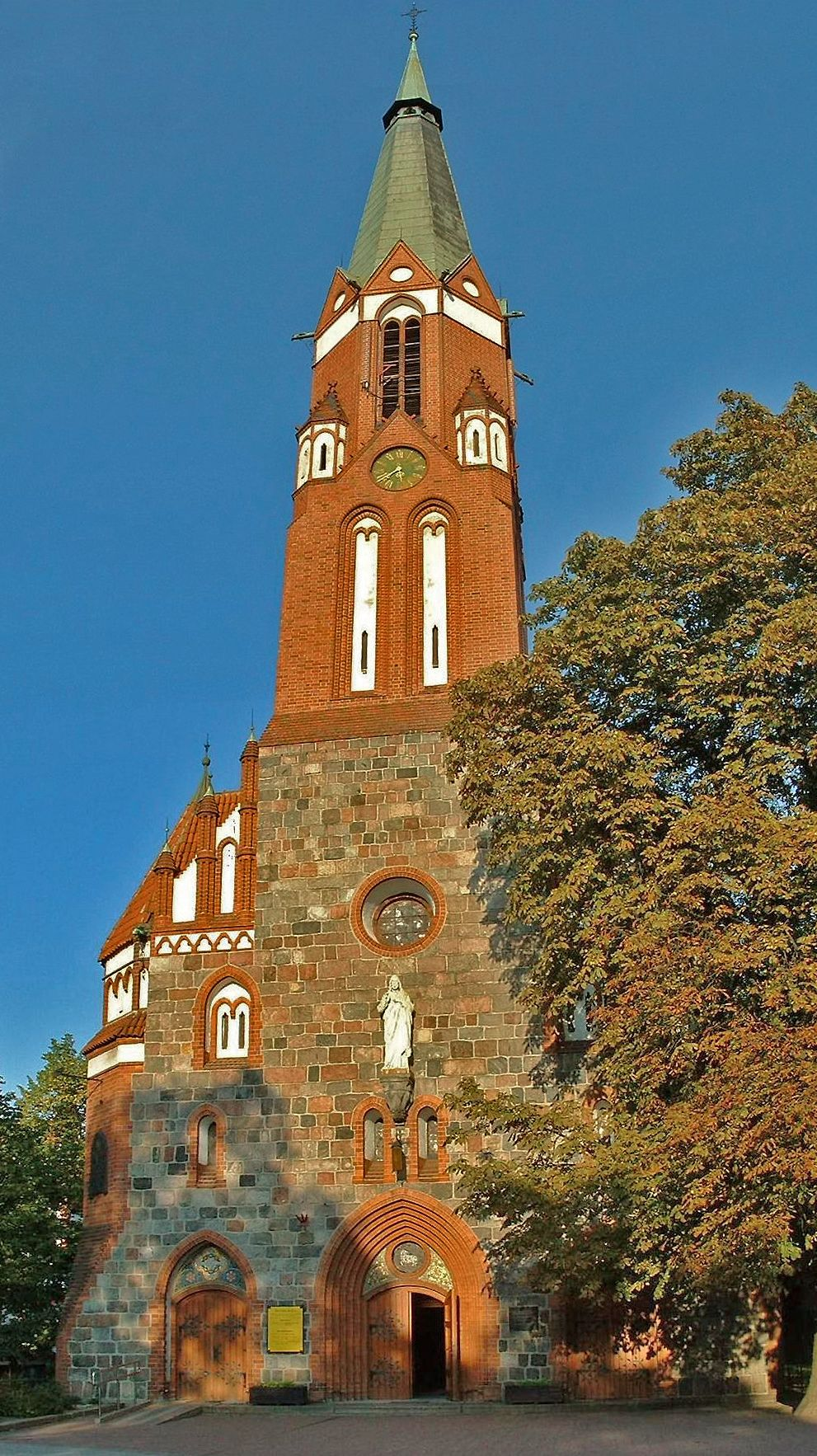 Sopot, pl. Konstytucji 3 Maja 2 - dawny kościół ewangelicki p.w. Zbawiciela, obecnie rzymskokatolicki parafialny, garnizonowy p.w. św. Jerzego, 1889-1901